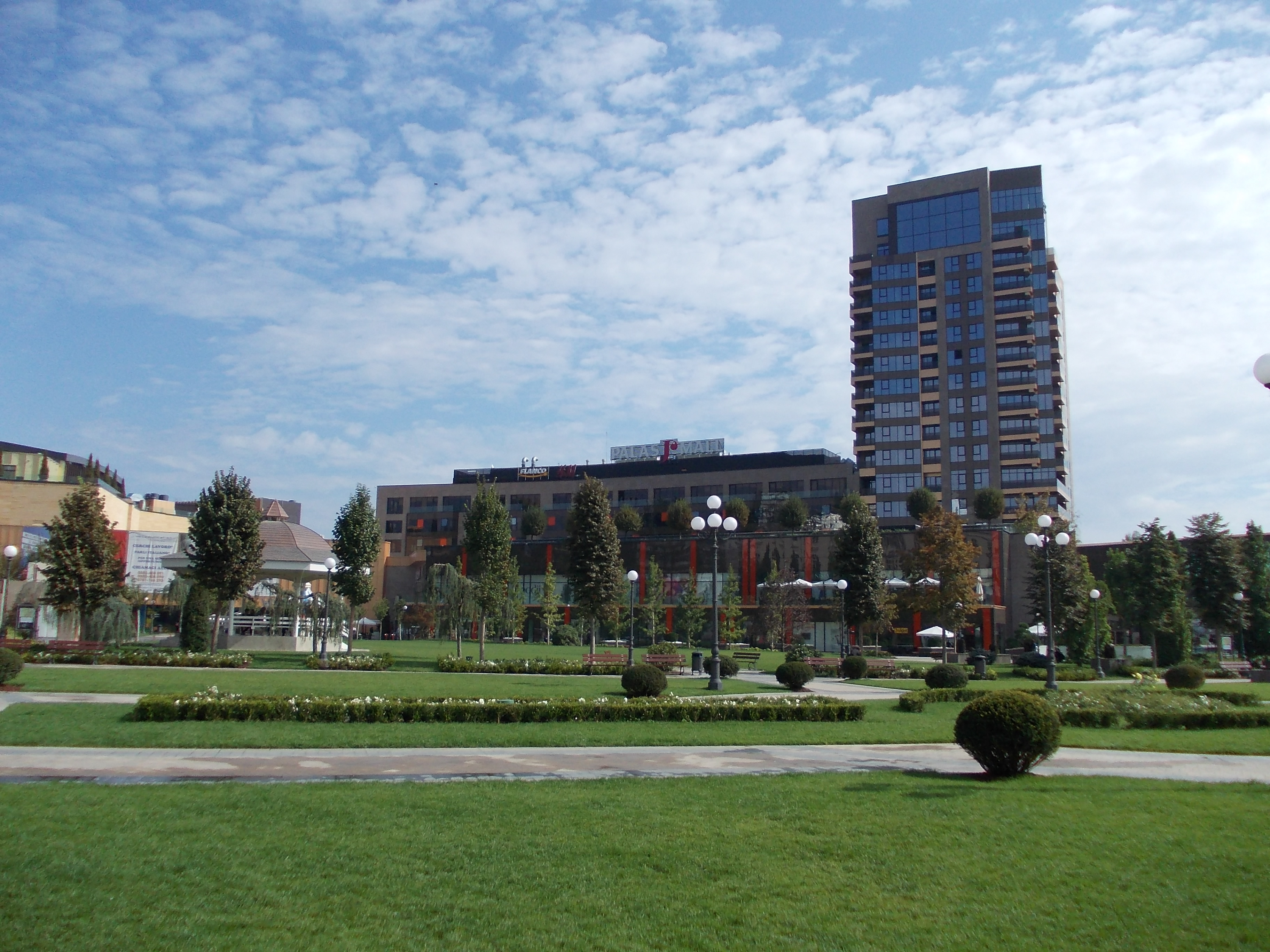 Centru_Comercial_Palas